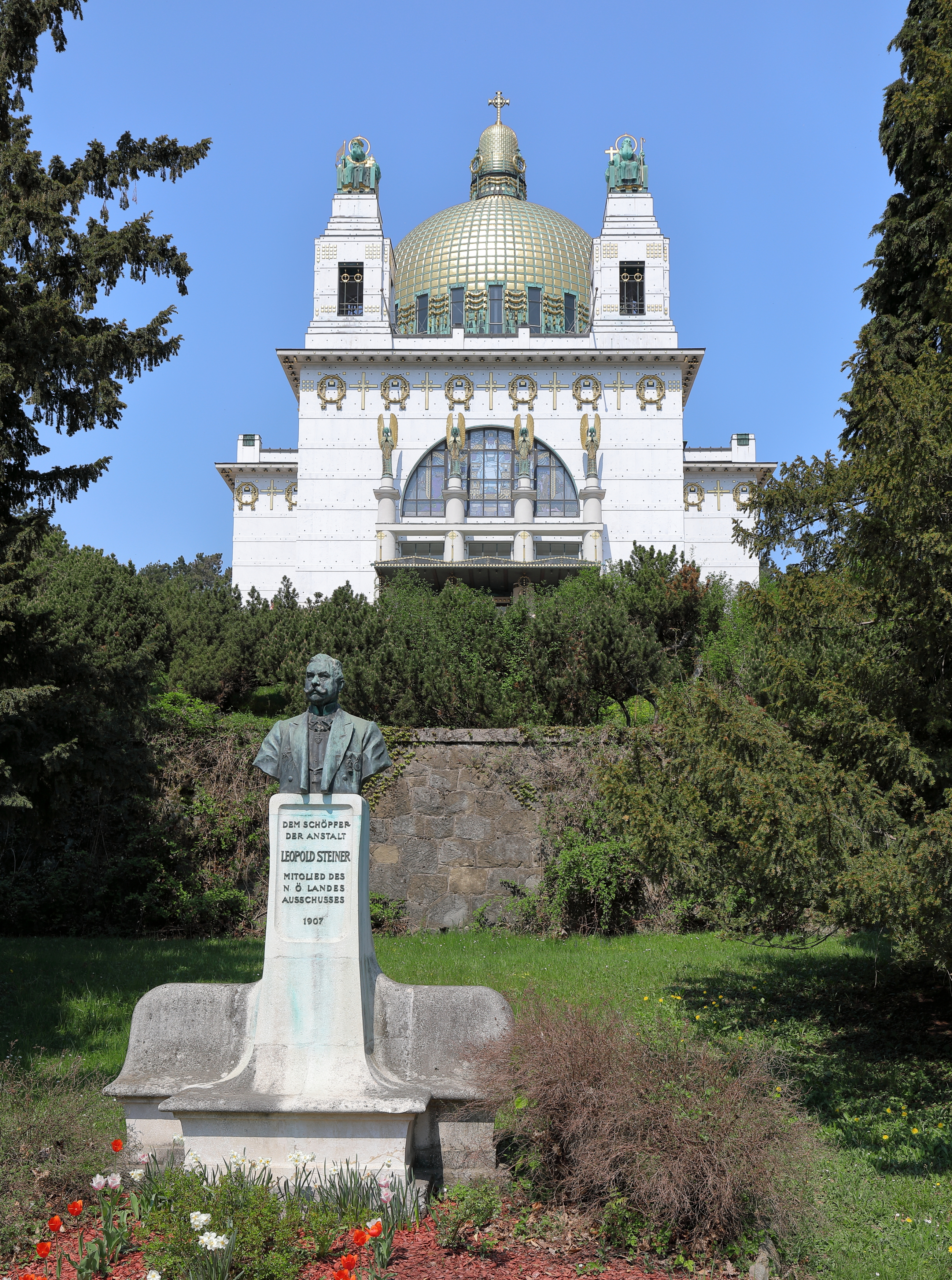 Hauptfassade bzw. Südansicht der Kirche am Steinhof, auch Leopoldskirche bezeichnet, auf dem Gelände des „Sozialmedizinischen Zentrums Baumgartner Höhe“ im 14. Wiener Gemeindebezirk Penzing und das Leopold-Steiner-Denkmal.Die Kirche wurde von 1904 bis 1907 über dem traditionellen Grundriss eines griechischen Kreuzes nach Plänen des Architekten Otto Wagner als Anstaltskirche errichtet. Sie ist der bedeutendste Sakralbau der Wiener Moderne in Wien. Das Steiner-Denkmal entstand 1907 und zeigt den späteren Landeshauptmann von Niederösterreich, der die Bauoberleitung der Spitalsanlage, inklusive der Anstaltskirche, inne hatte.